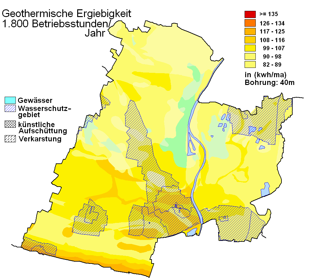 Geothermische Karte von Minden, Nordrhein-Westfalen.